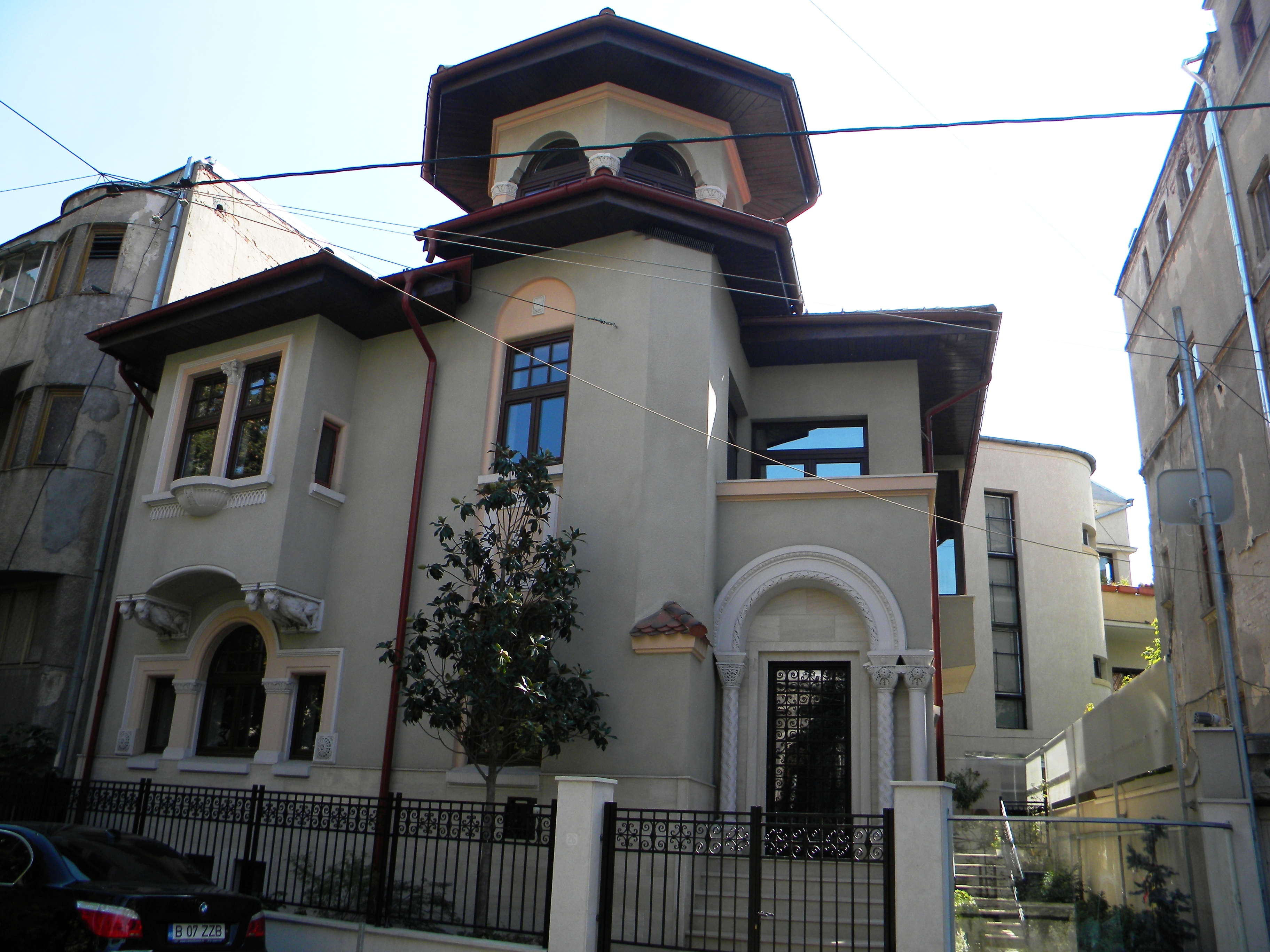 Casa pe Str. Dumbrava Rosie nr. 26, Bucuresti sect. 2 (2)